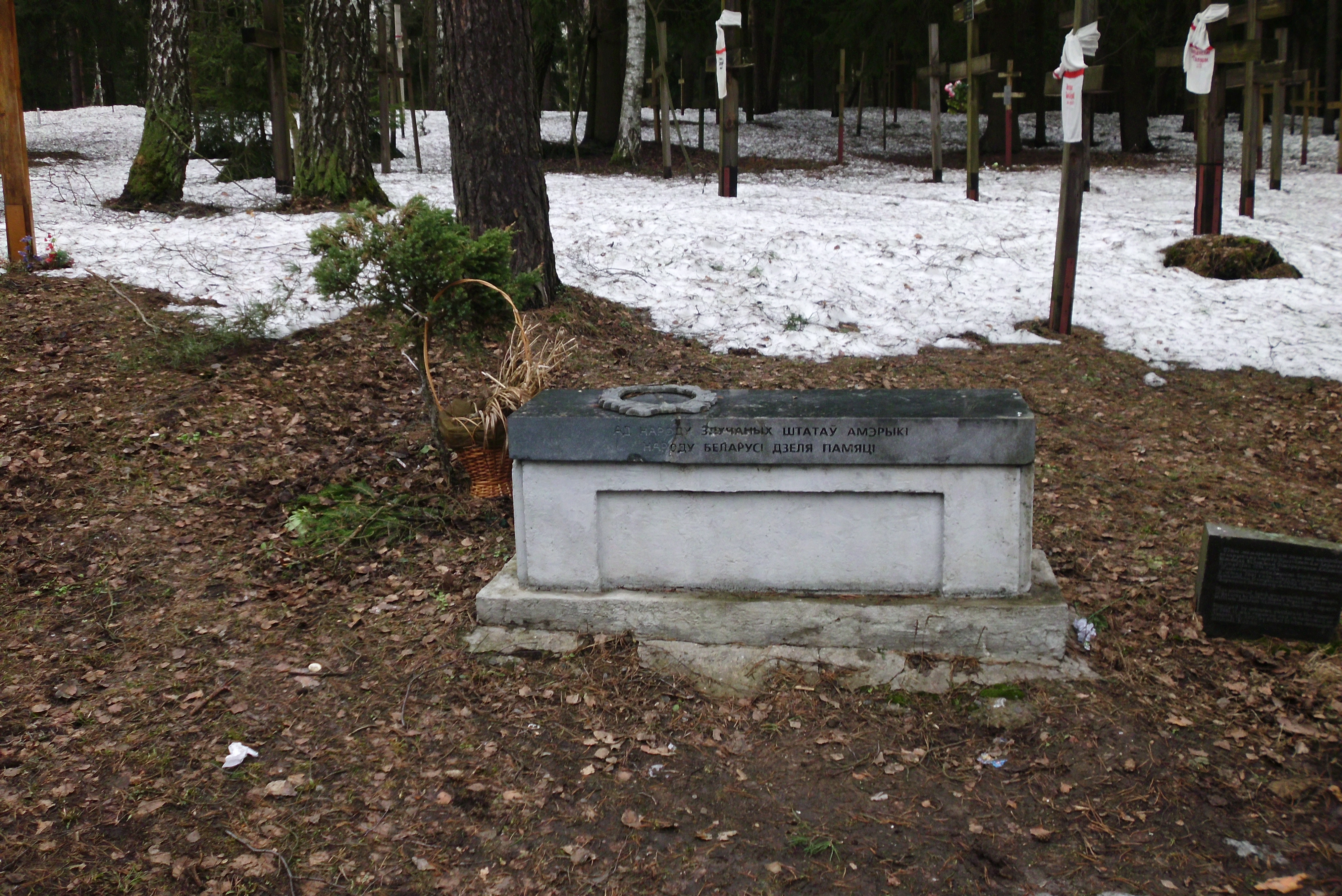 Kwiecień 2013